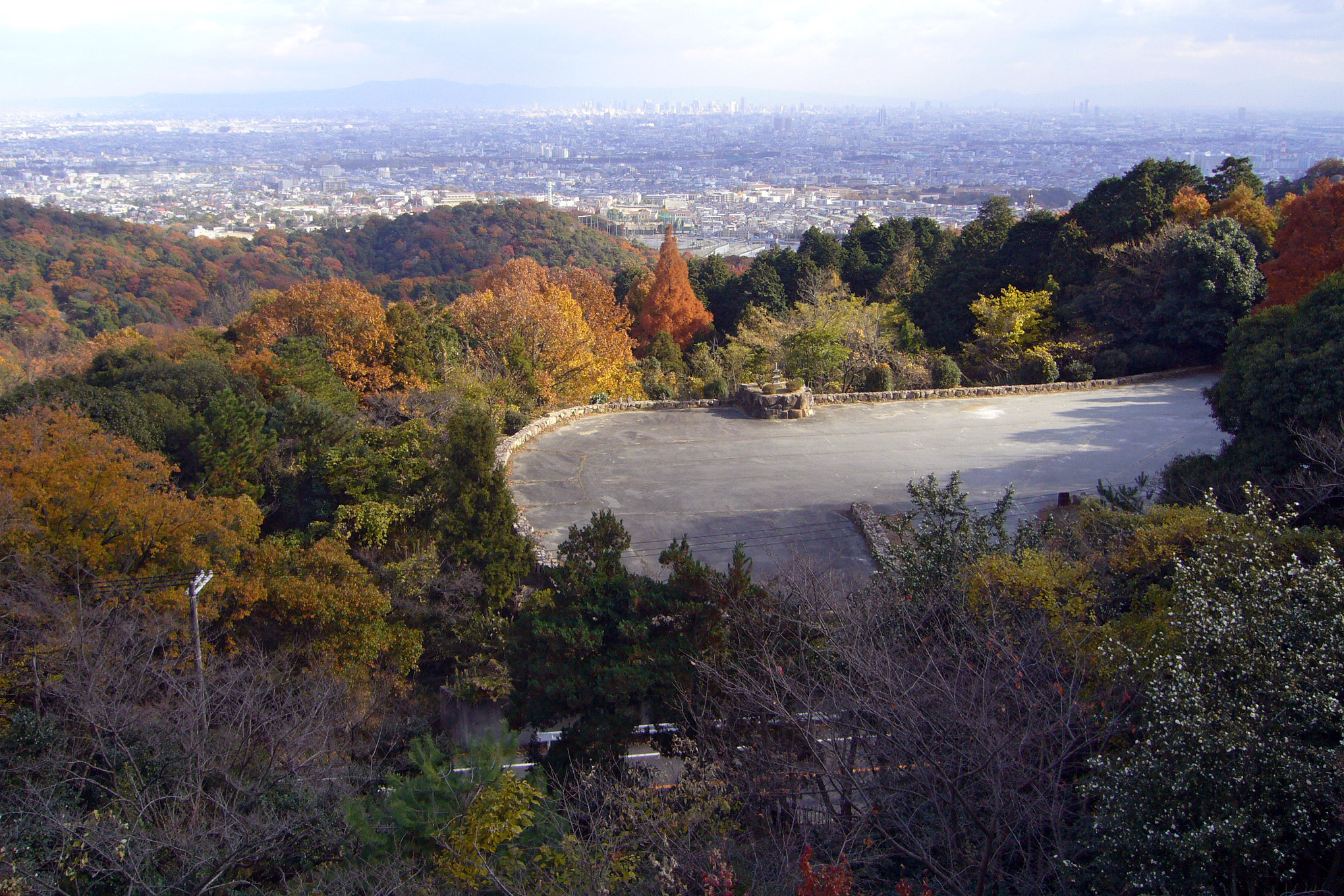 Kannoji in Nishinomiya, Hyogo prefecture, Japan